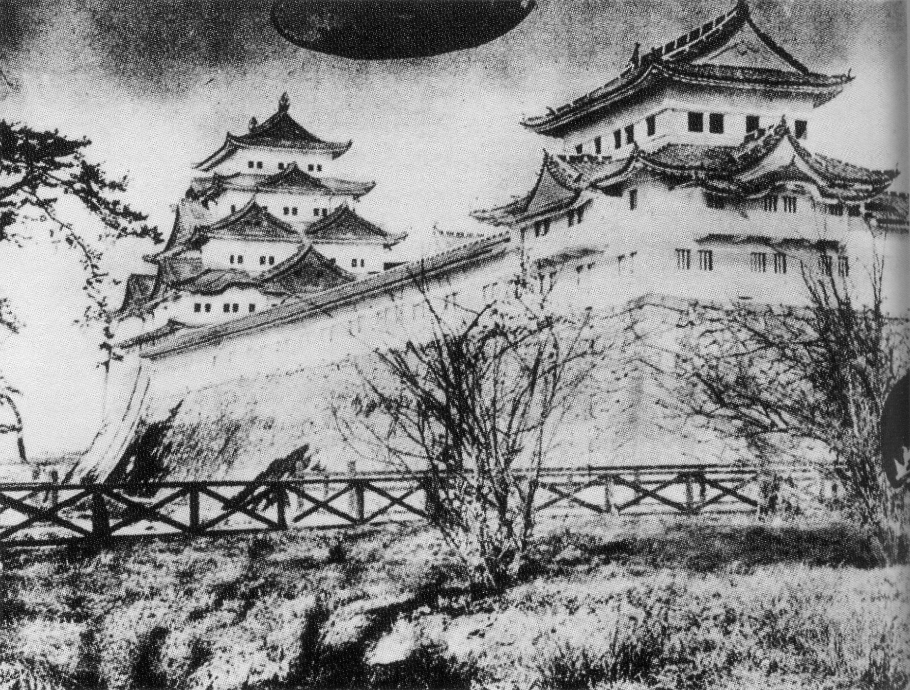 本丸西南面の景観。明治初期の撮影。大天守と西南隅櫓を多聞櫓で結ばれている。多聞櫓は現在失われている。